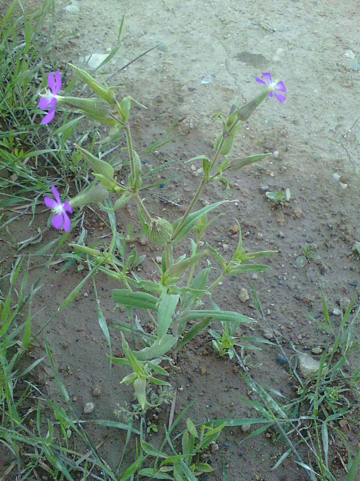 گیاهان خودروی دامنه الوند، دشت کوزه کولان بهار